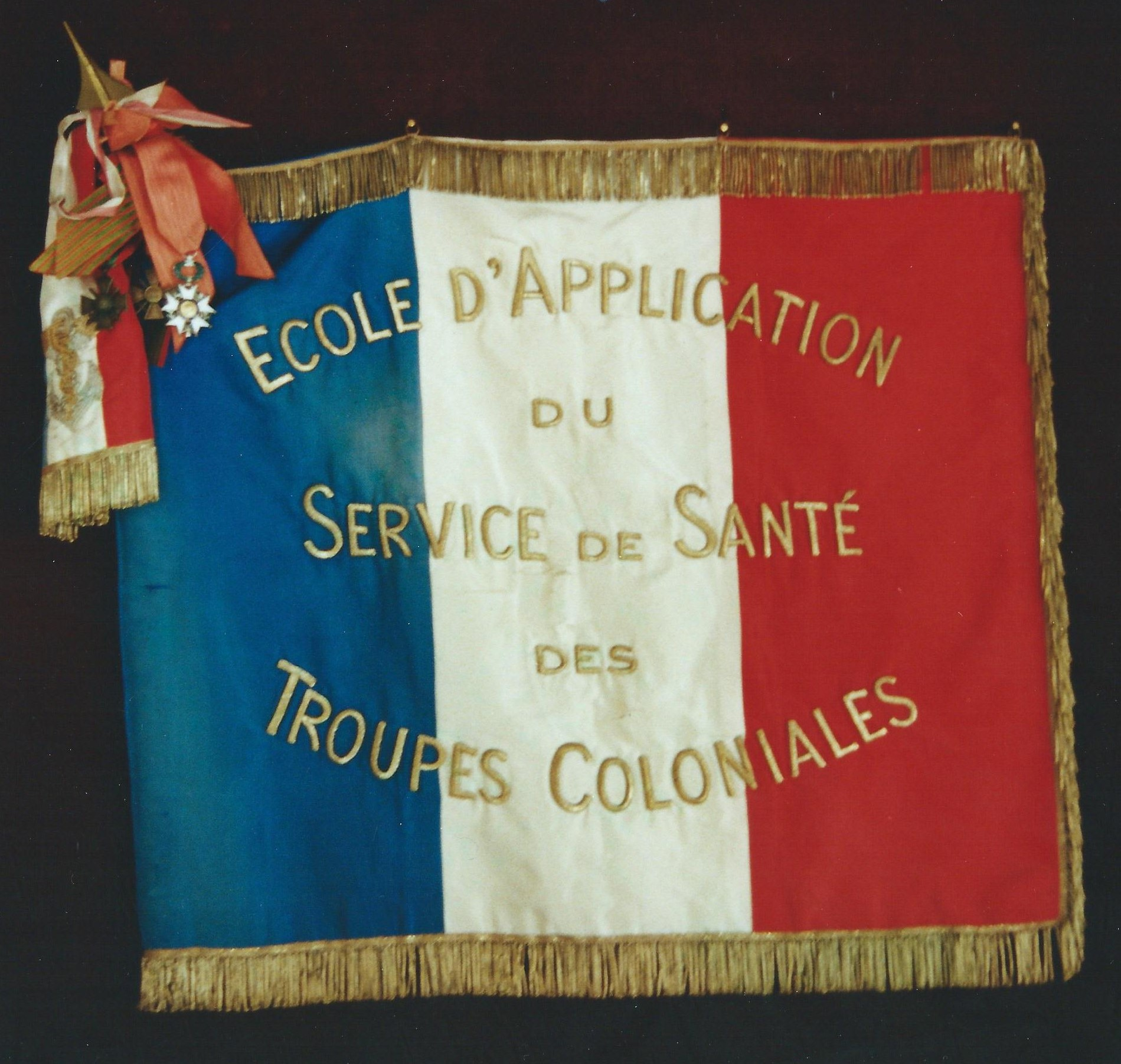 Drapeau de l'Ecole du service de santé des troupes coloniales, Le Pharo, Marseille, France